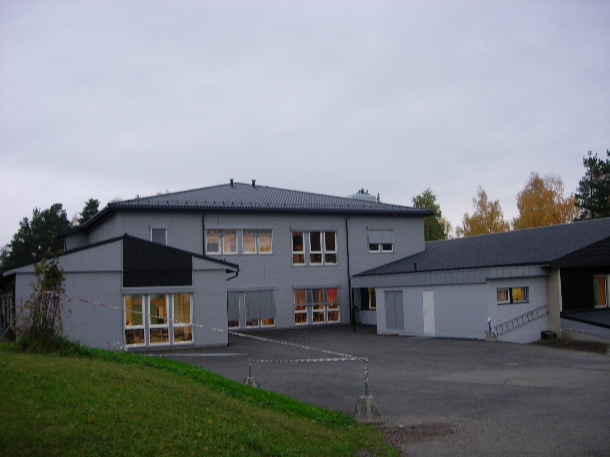 Kapp skole sett fra sør.